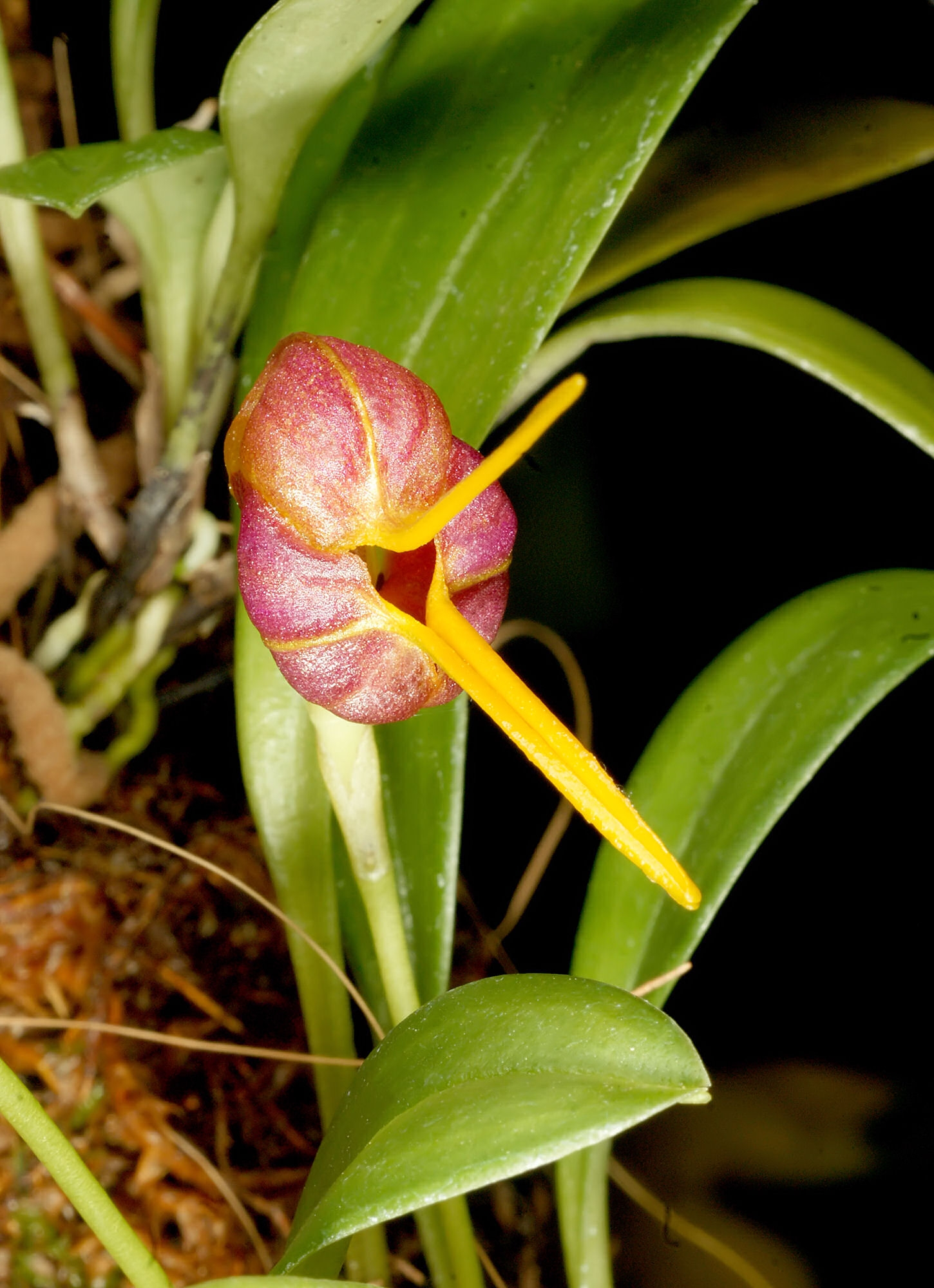 Masdevallia encephala